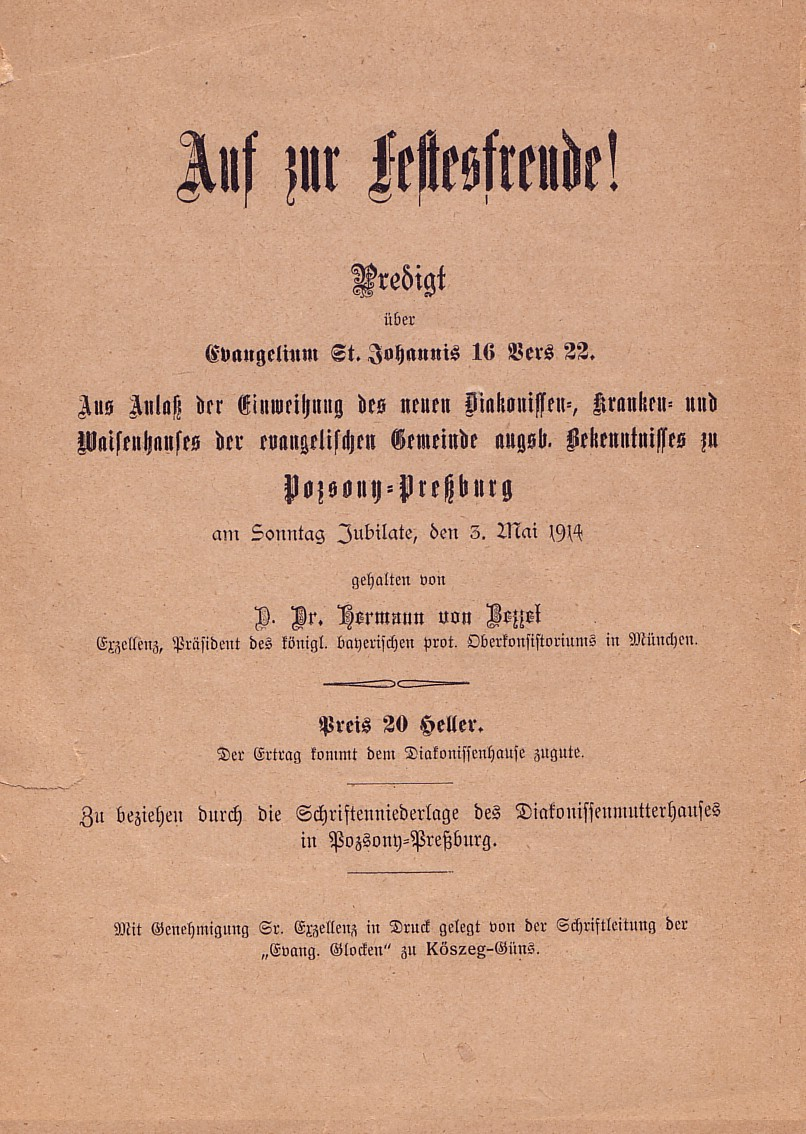 Diakonissenheim (Bratislava)